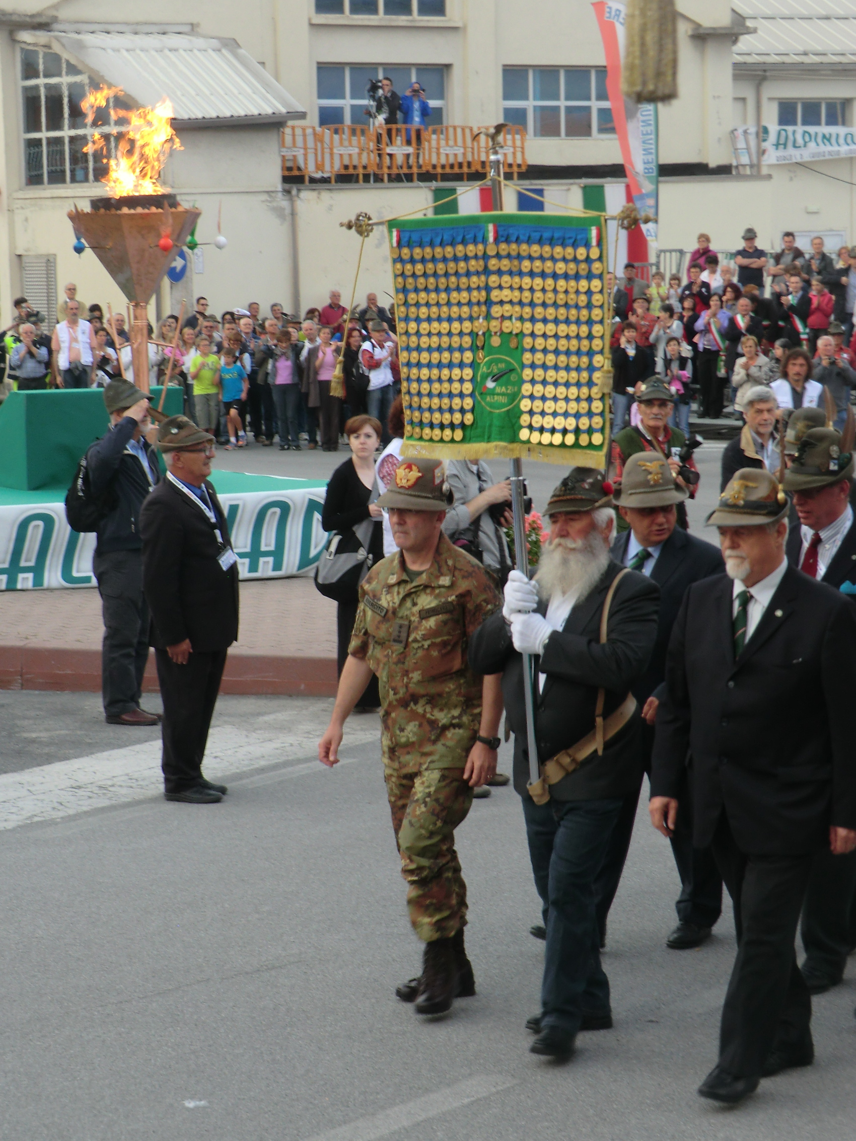 Il Labaro, simbolo dell'Associazione Nazionale Alpini con il suo presidente Sebastiano Favero ed comandante delle truppe alpine Alberto Primicerj